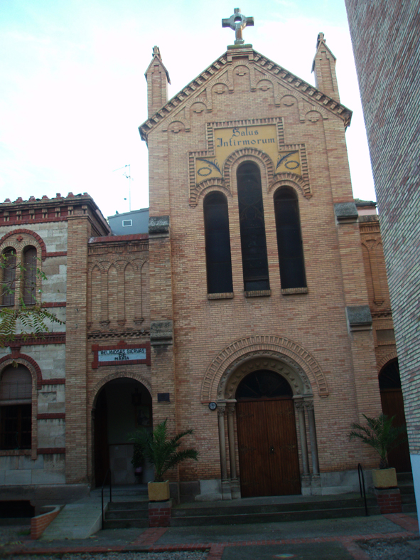 Convento de las Siervas de María de Tudela, en 2010